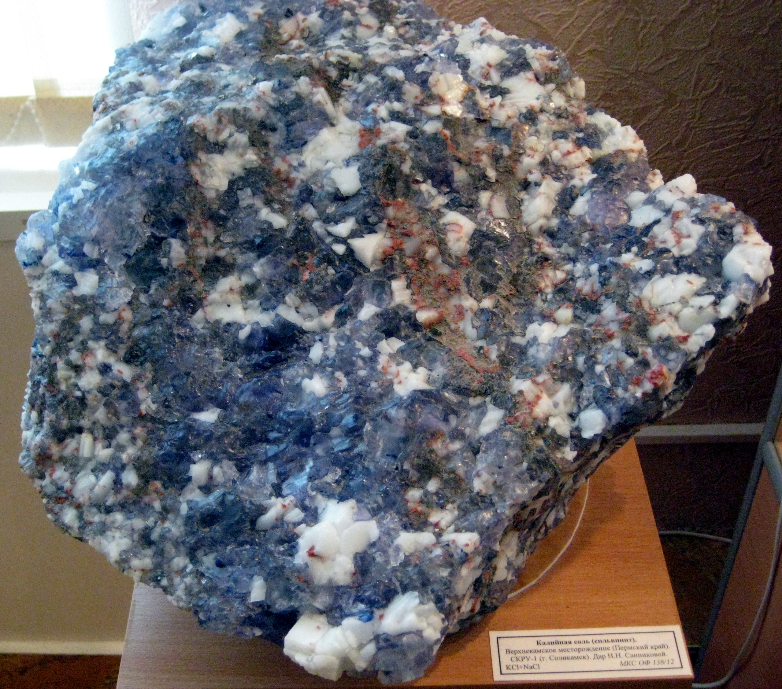 Sylvinite Сильвинит. Верхнекамское месторождение (Пермский край). СКРУ-2 (Соликамск). Дар Н.Н. Санниковой. KCl+NaCL